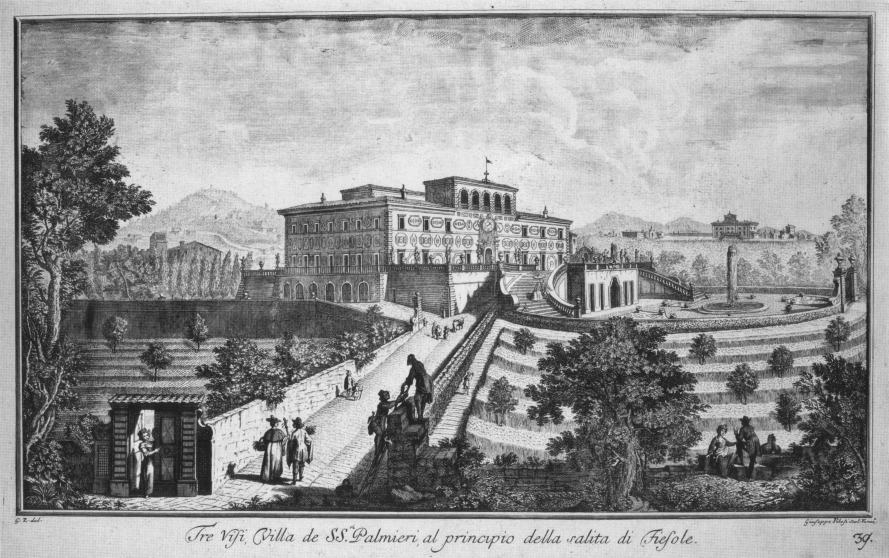 Zocchi, ville 41 palmieri